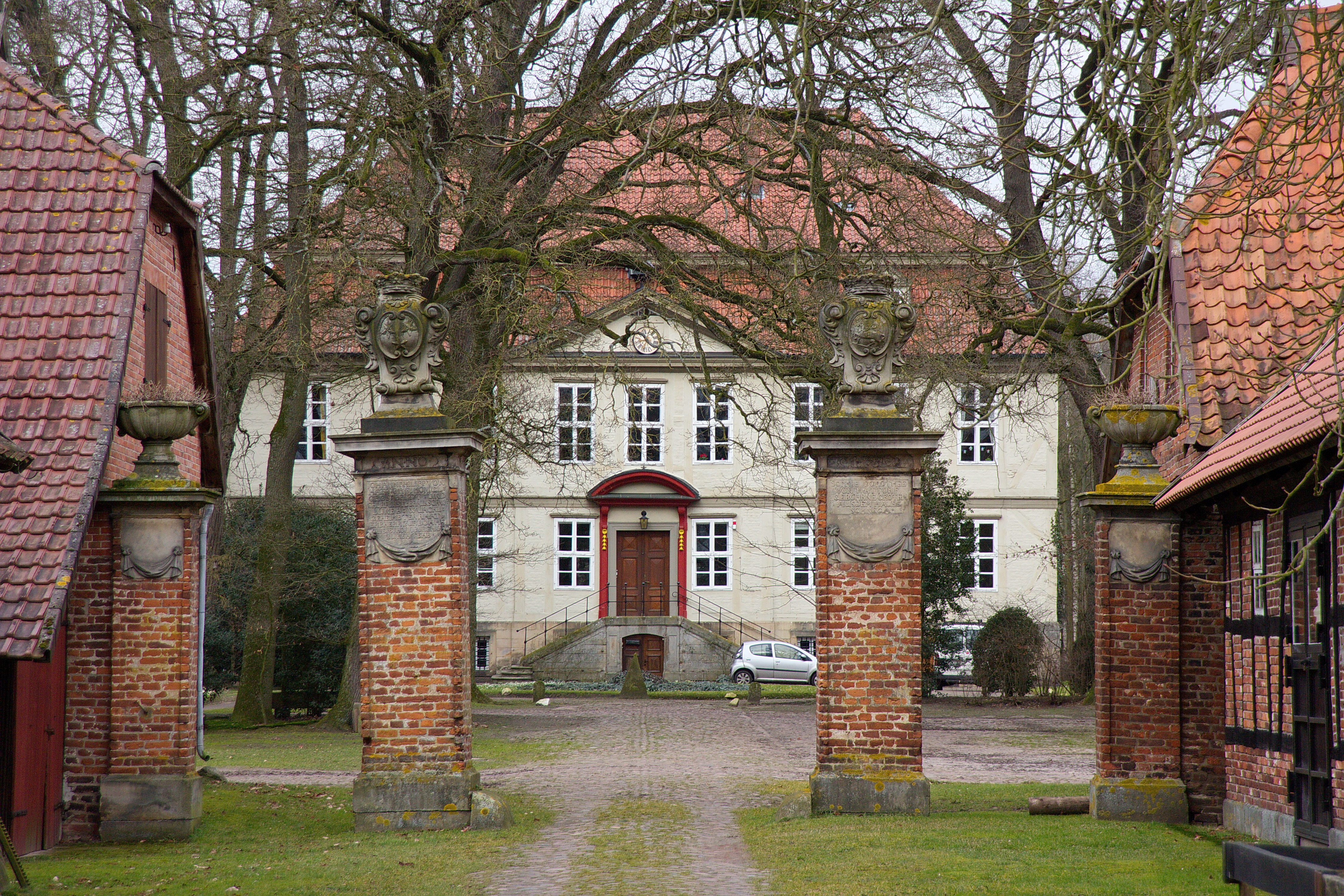 Rittergut Böhme in Böhme, Niedersachsen, Deutschland